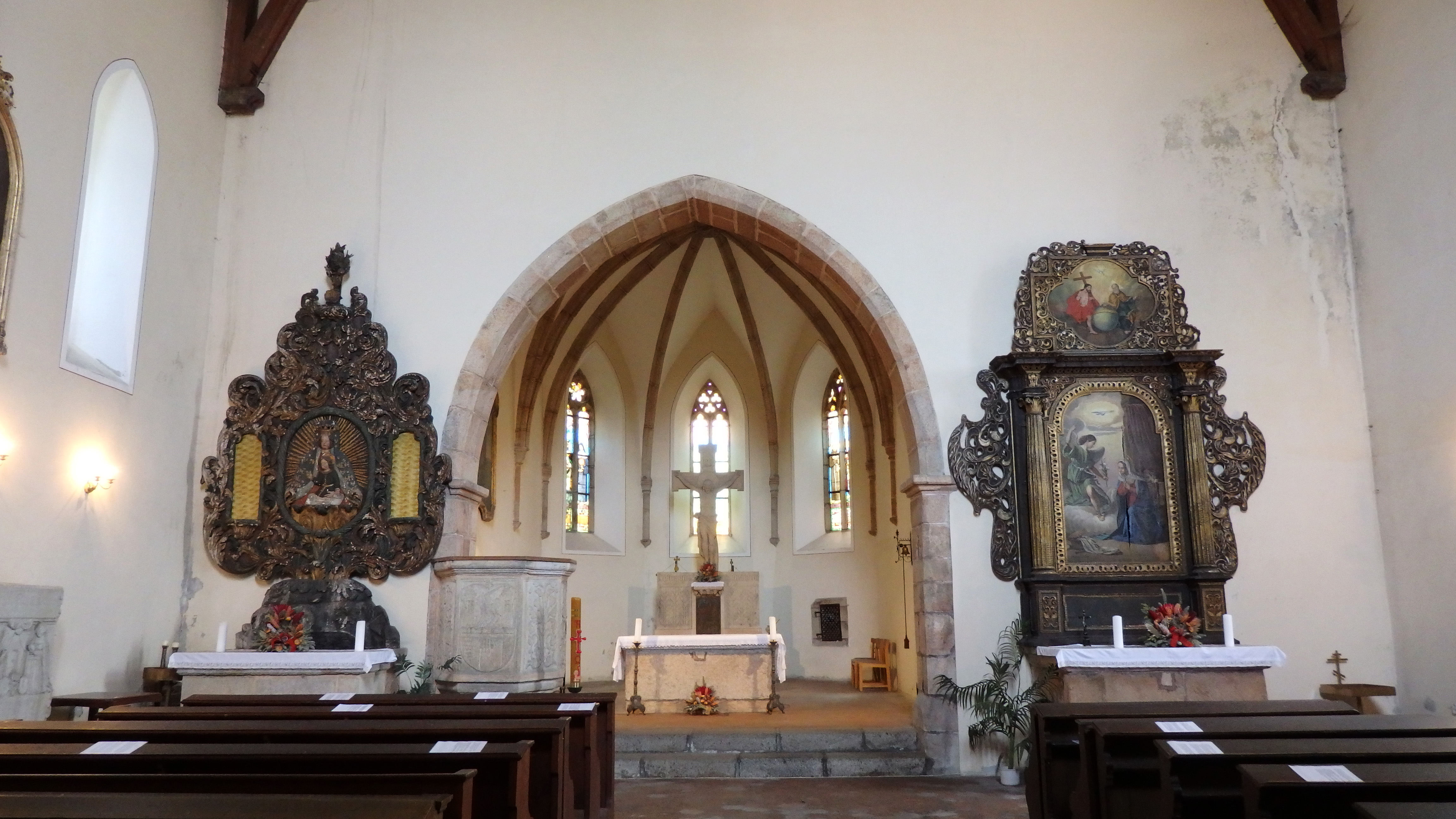 Interiér